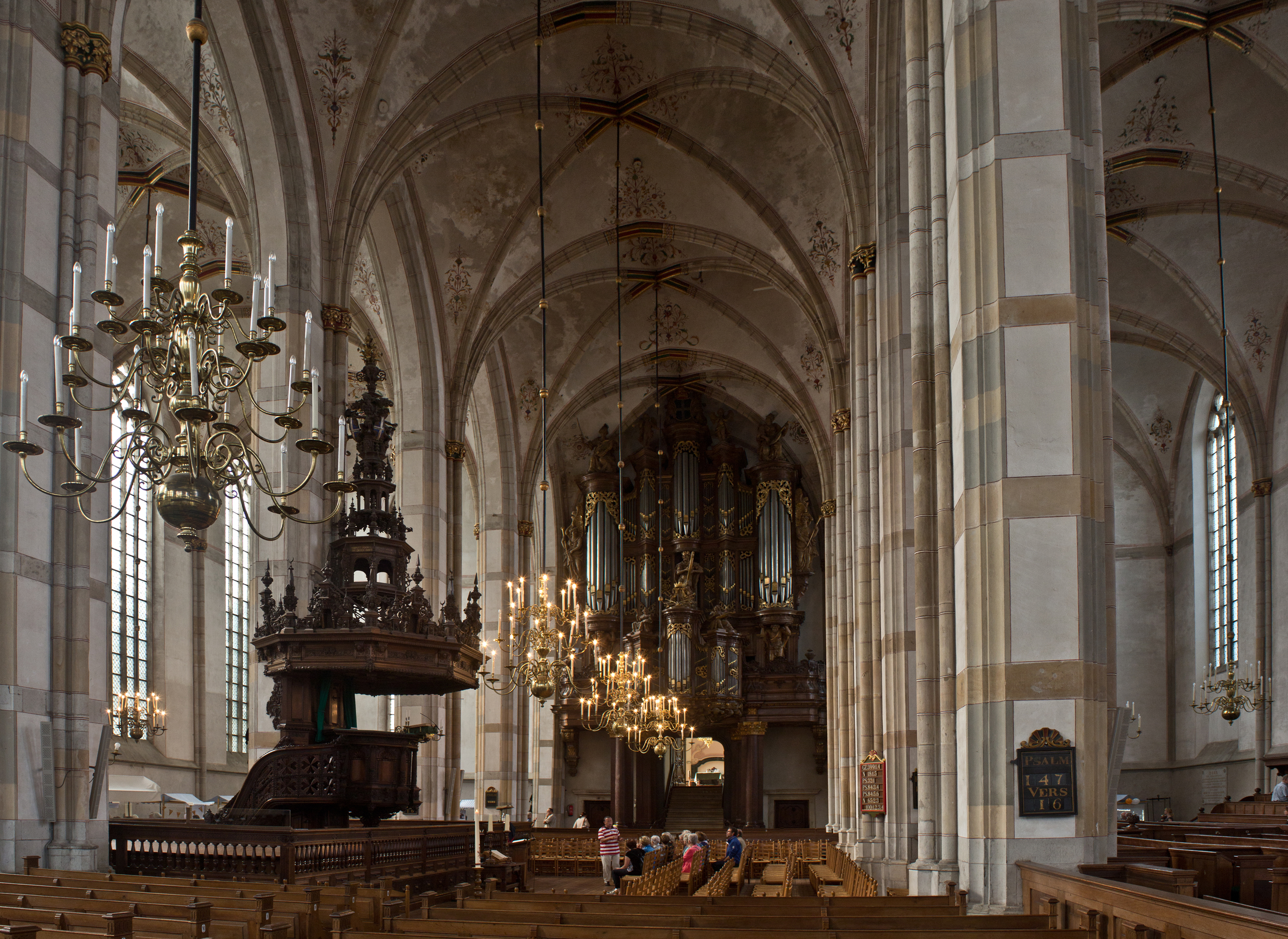 Zwolle, Grote of Sint-Michaëlskerk